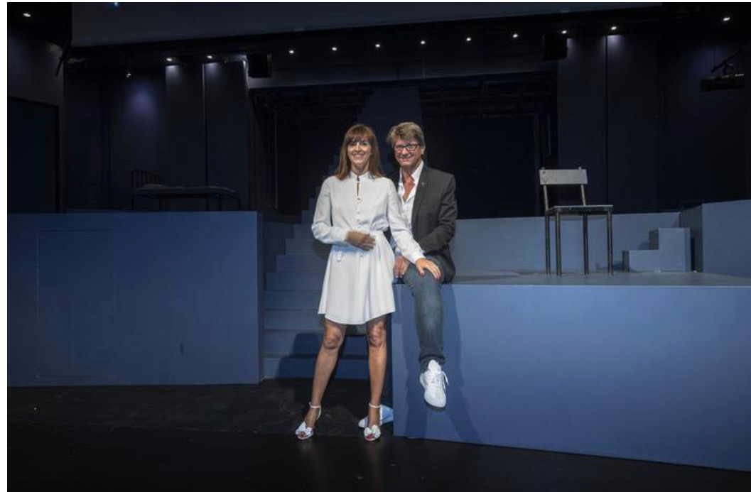 Photo de Mélanie et Frédéric Biessy dans le décors de Scala